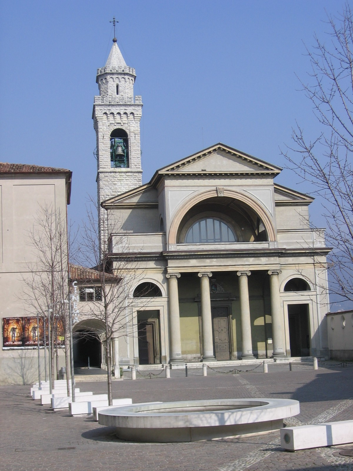 Parrocchia di San Giuliano, Albino, Bergamo, Italy